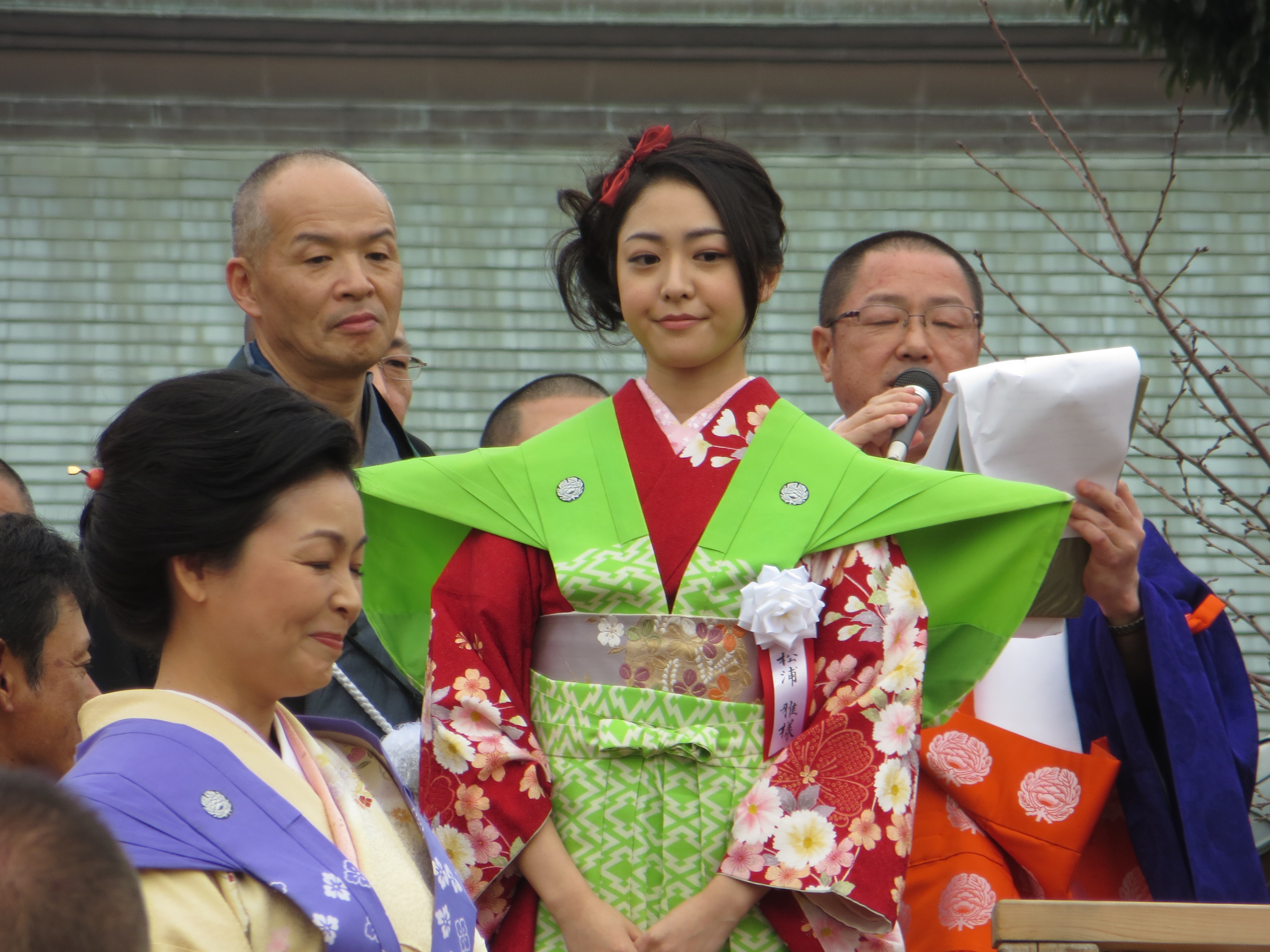 西門ふ久役の子＾＾